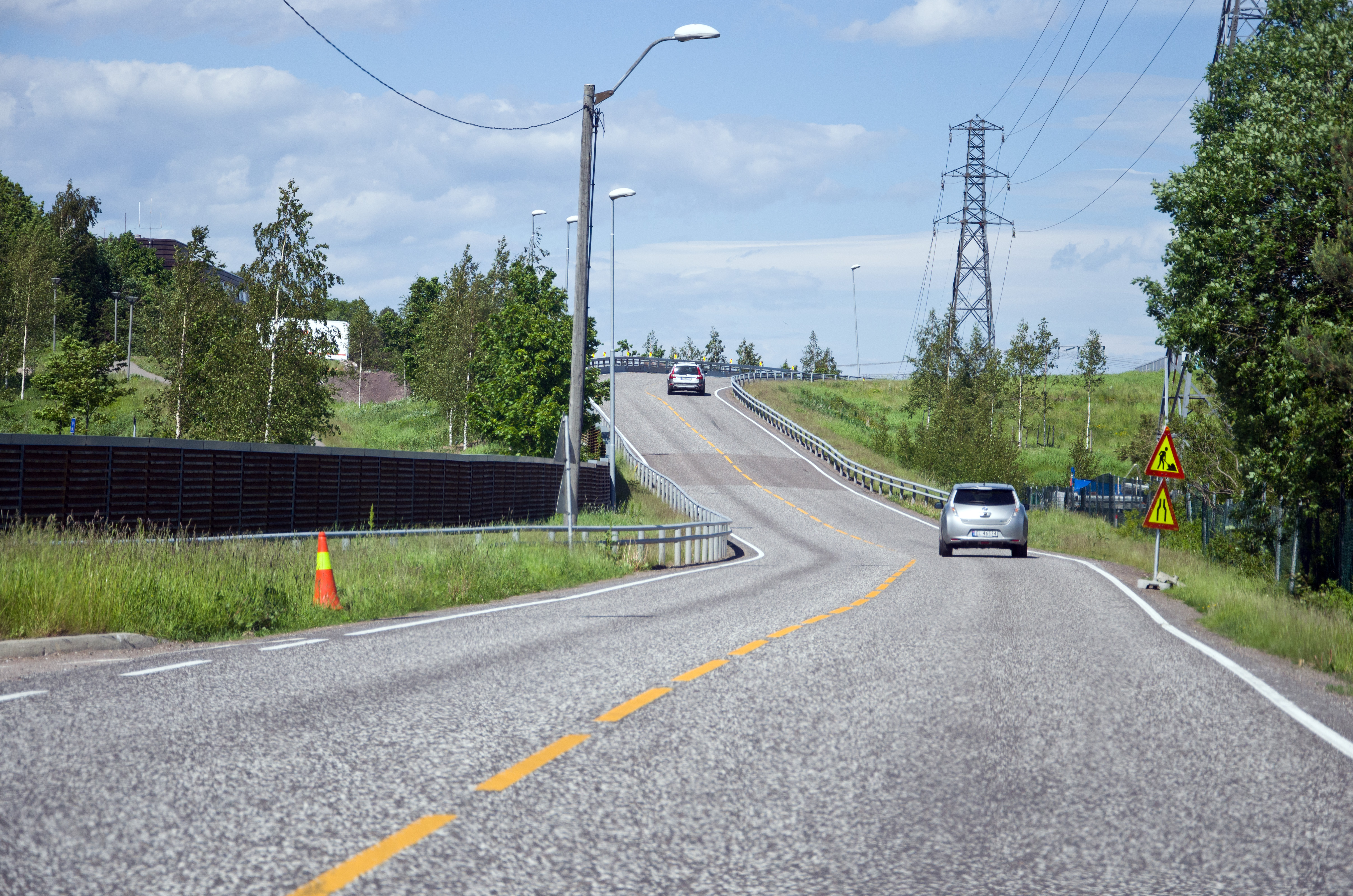 Slagenveien, Tønsberg